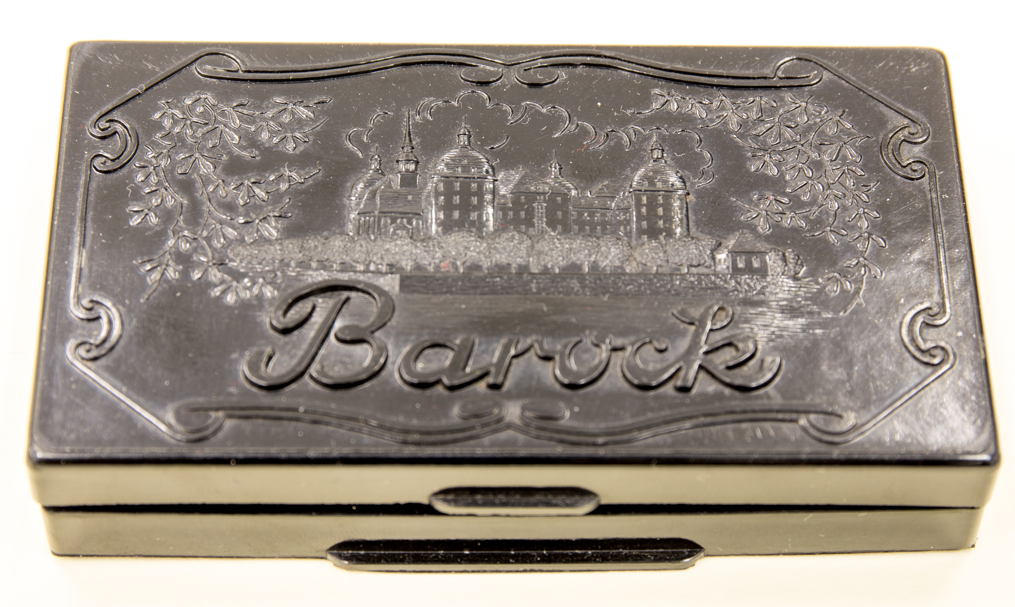 Stempelkissen Barock Indetifikations-Nr.: D´N (9 A) 434/2013 Datierung: 1955-1965 Gebrauchsort: Dresden, Berlin (Ost), DDR; Herstellungsort: Dresden, DDR Hersteller: VEB Bürochemie Dresden Höhe x Breite x Tiefe: 1,5 x 9,5 x 6 cm Ausgabe: Bakelit, Textfiles Zustand: 1. unbedenklich / gut Beschreibung: Kästchen, Stempelkissen aus Bakelit, zum Aufklappen, mit innenliegendem Kissen, derzeit rot; geprägte Abbildung auf dem Deckel: Schloss Moritzburg und Aufschrift Barock. Deckel geprägt: VEB Bürochemie Dresden